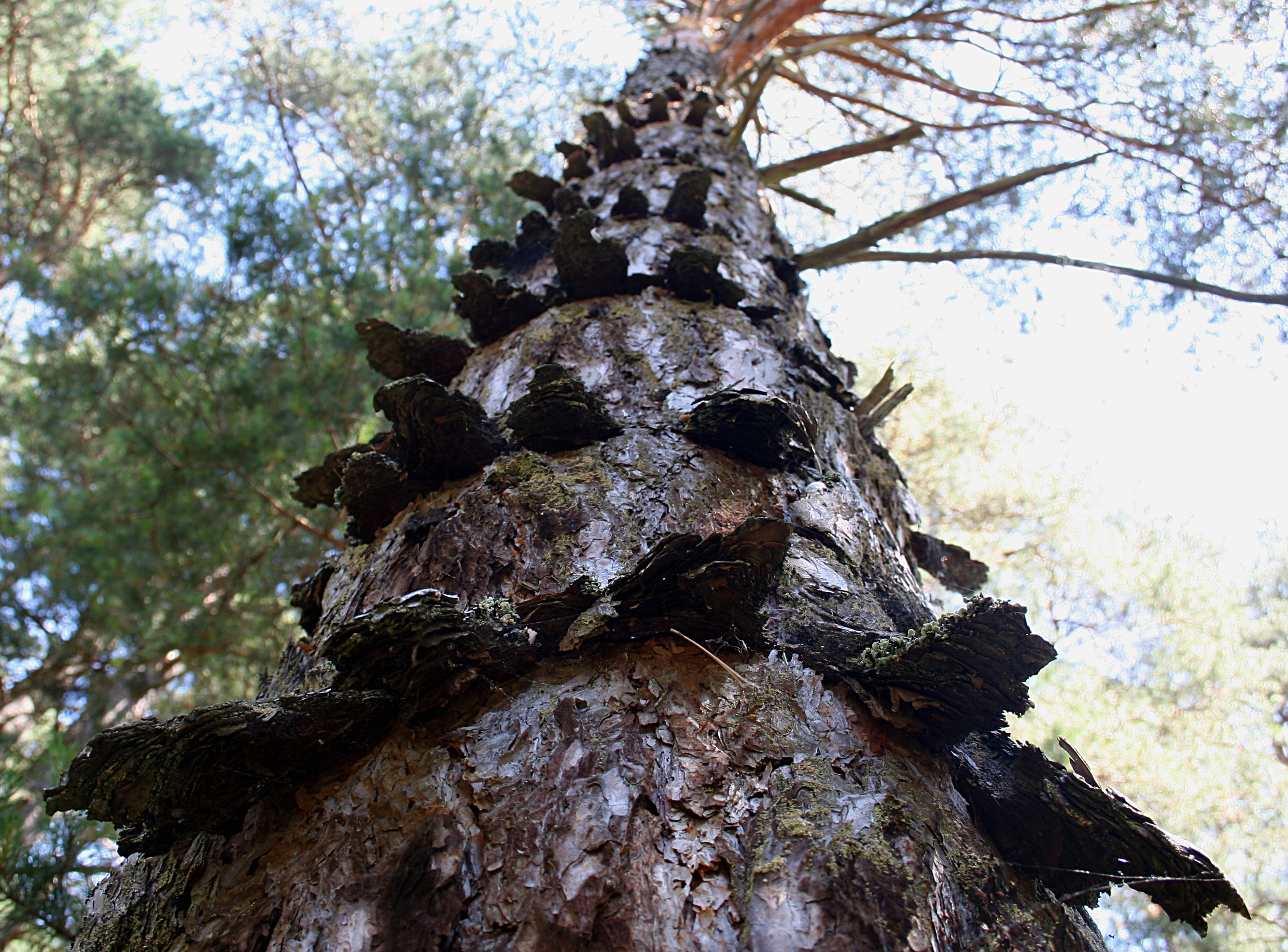 Park Narodowy Bory Tucholskie, fragment pnia sosny zwyczajnej - odmiana kołnierzykowata